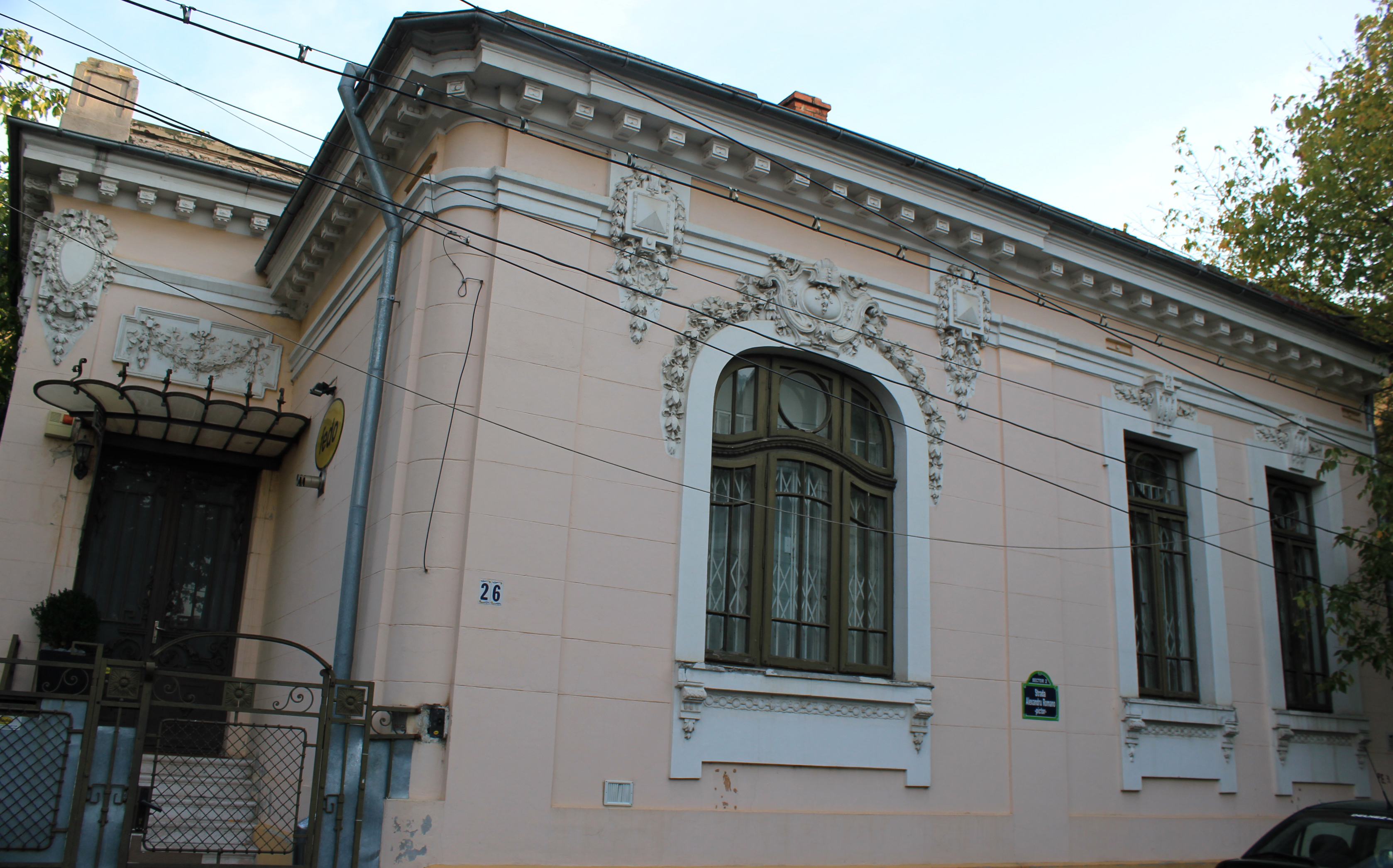 Casa Romano Alexandru 26